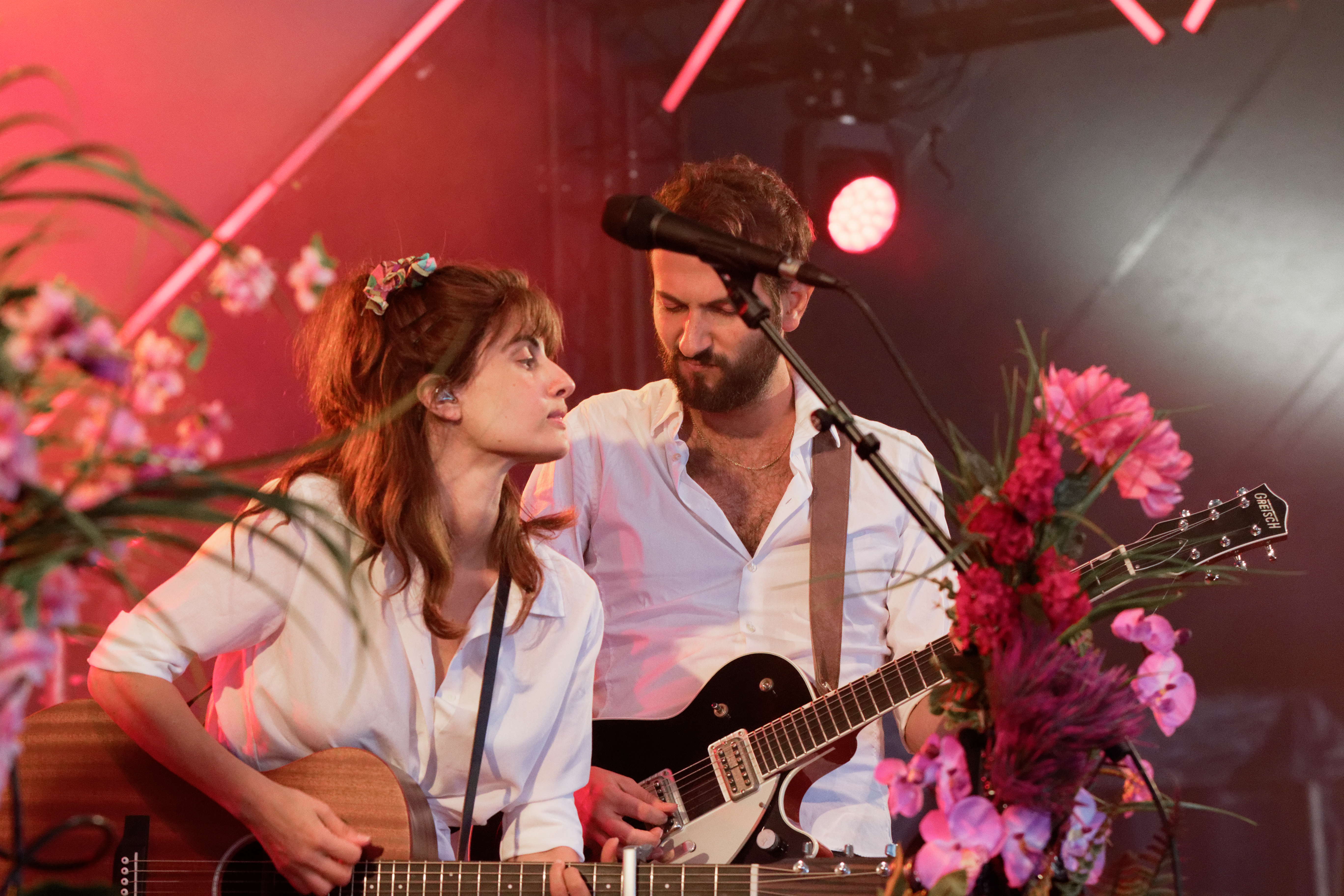 Lola Marsh en concert sous le chapiteau de Seb lors du festival du Bout du Monde 2018 à Crozon dans le Finistère (France).